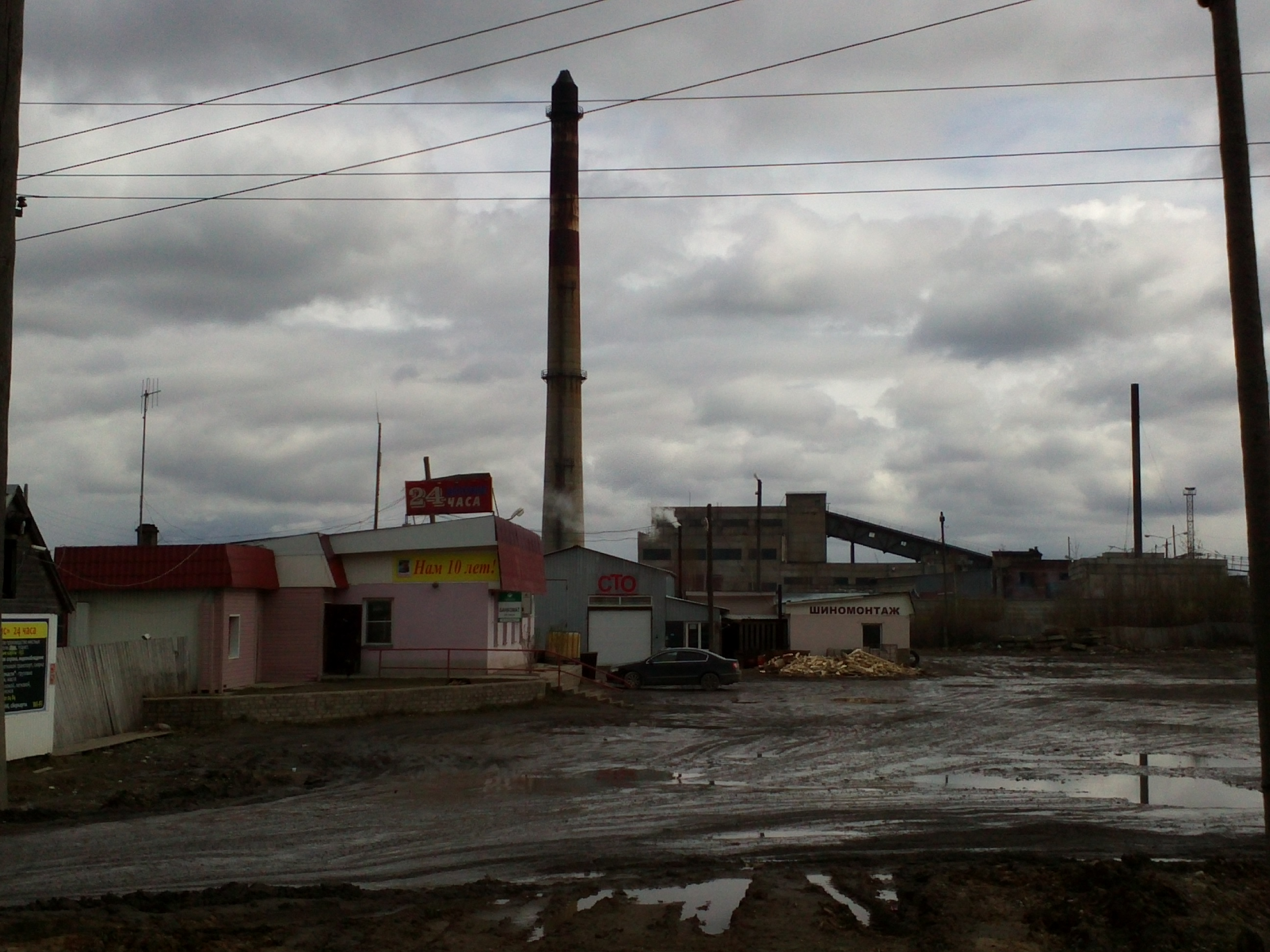 Omutninsk